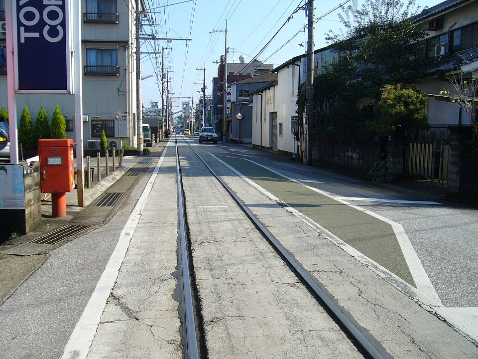 曙町東町停留場 東望